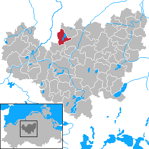 Hohen Sprenz in Mecklenburg-Vorpommern - District Güstrow